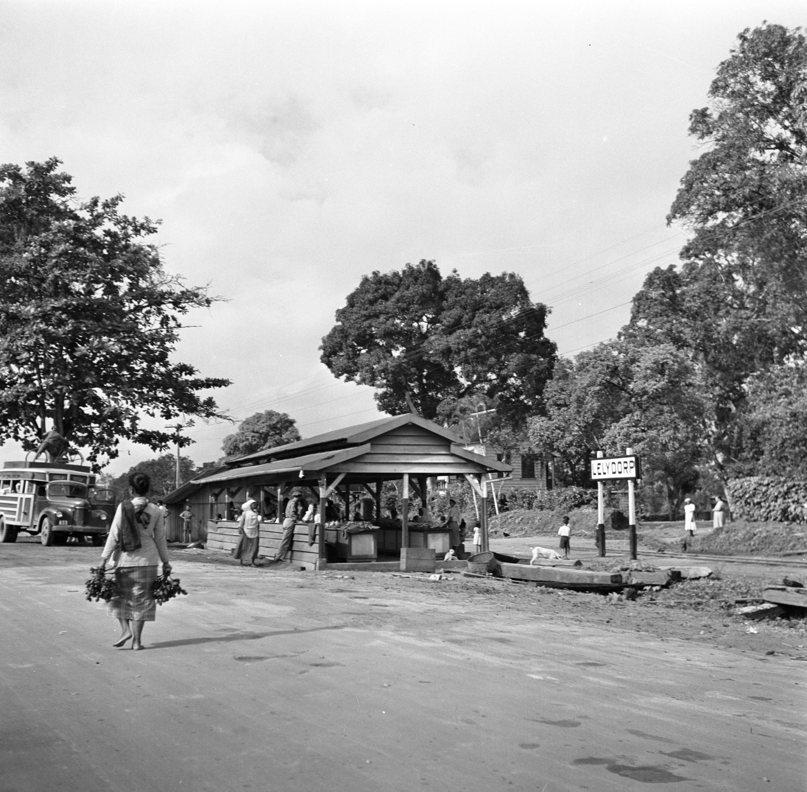 Collectie / Archief: Fotocollectie Van de Poll Reportage / Serie: Reis naar Suriname en de Nederlandse Antillen Beschrijving: Markthal bij Station Lelydorp in Suriname Datum: 1947 Locatie: Lelydorp, Suriname Trefwoorden: markten, stations Fotograaf: Poll, Willem van de, [onbekend] Auteursrechthebbende: Nationaal Archief CC-BY Nummer archiefinventaris: bekijk toegang 2.24.14.02 Bestanddeelnummer: 252-6343